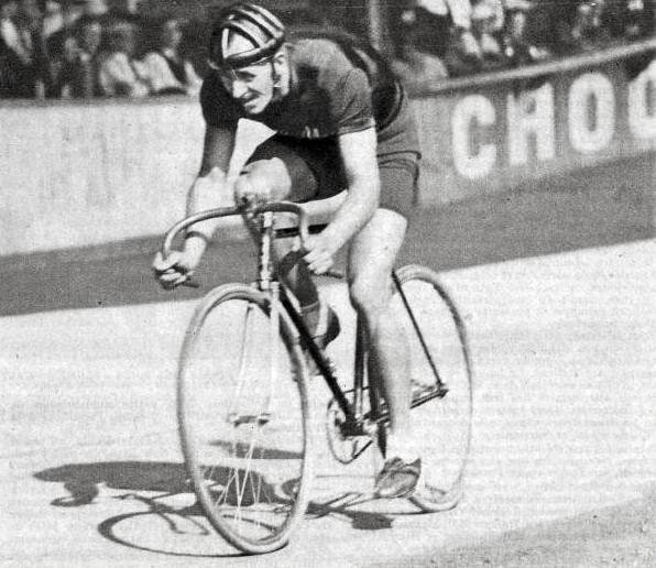 Jean Van Hout en août 1933 (ici à Buffalo). Depicted person: Jan van Hout – Dutch bicycle racer and track cyclist